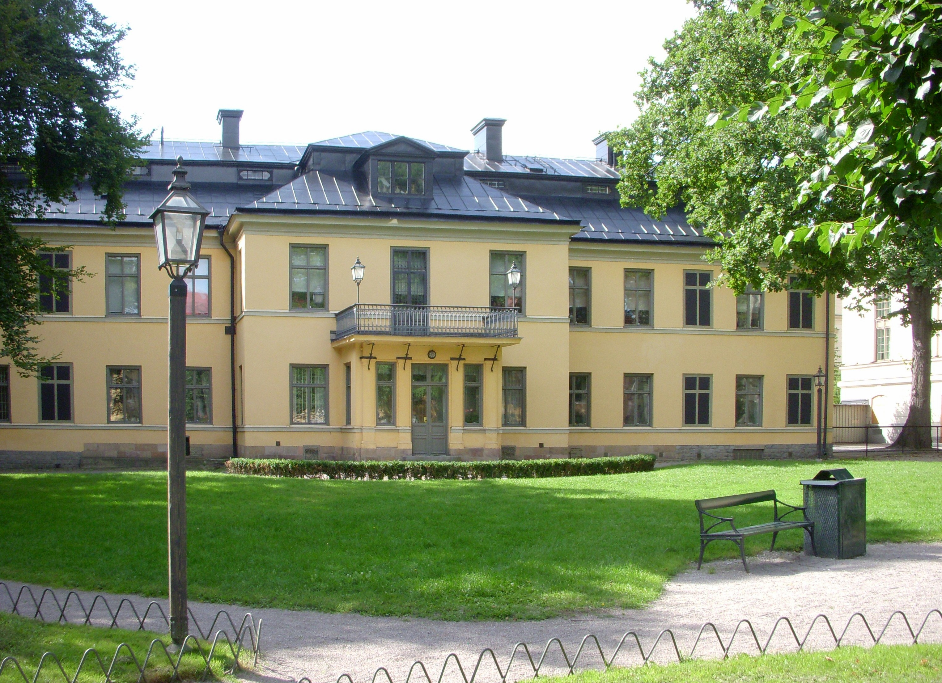 Schefflerska palatset, Drottninggatan, gårdssidan